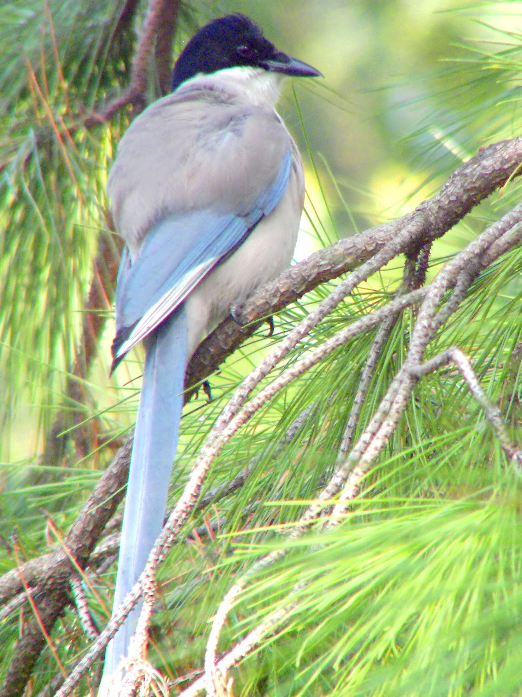 Azure-winged Magpie Cyanopica cyanus, Hong Kong, China.